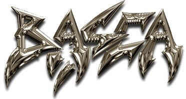 logo plateado